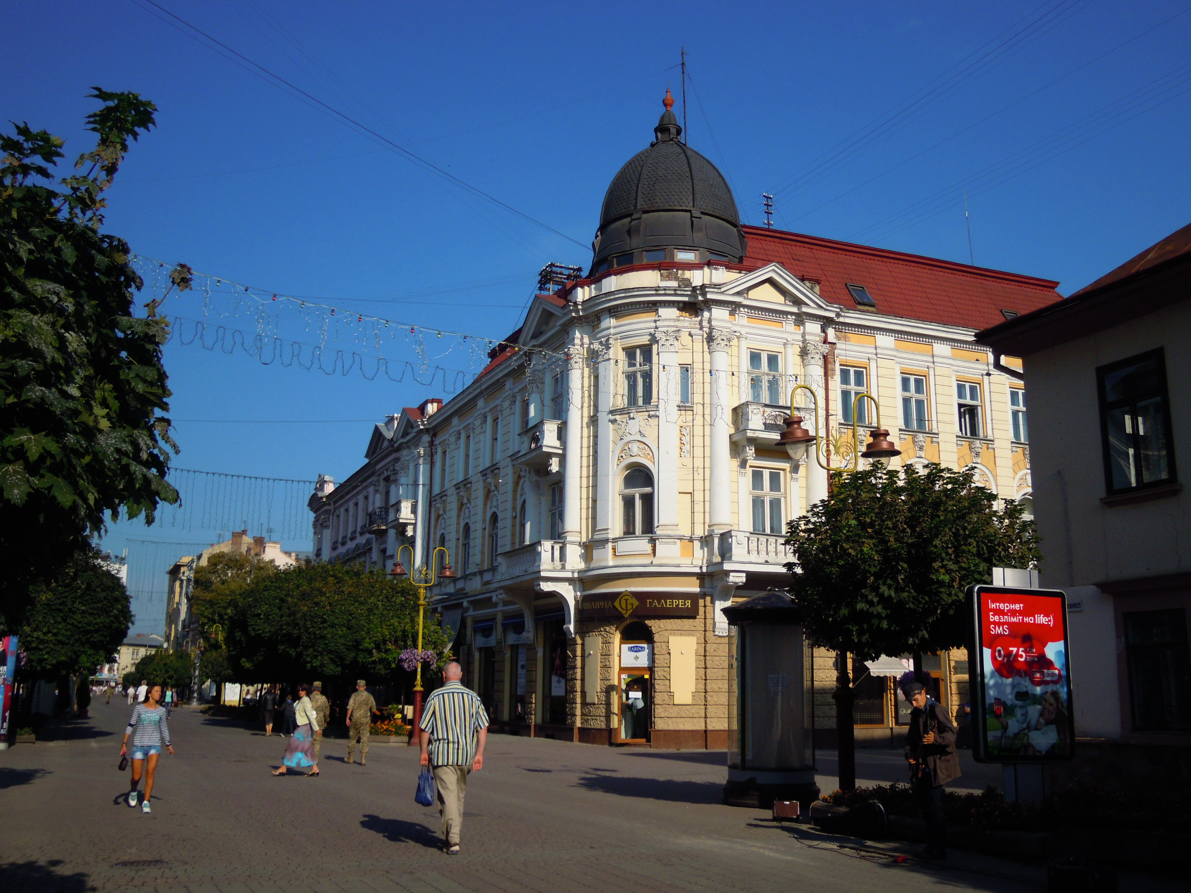 Житловий будинок (мур.), Івано-Франківськ, вул. Незалежності, 21